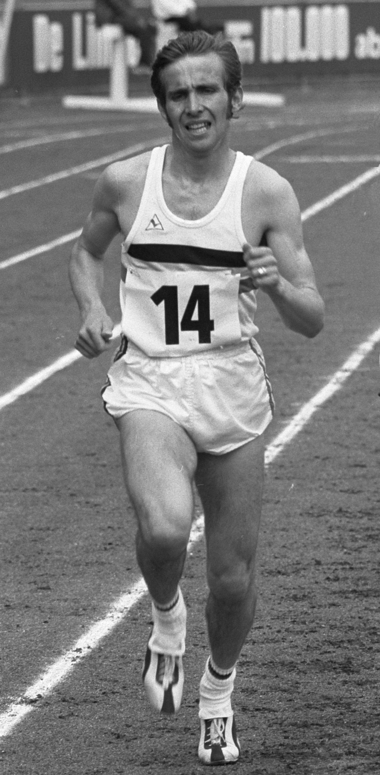 Willy Polleunis in Kerkrade